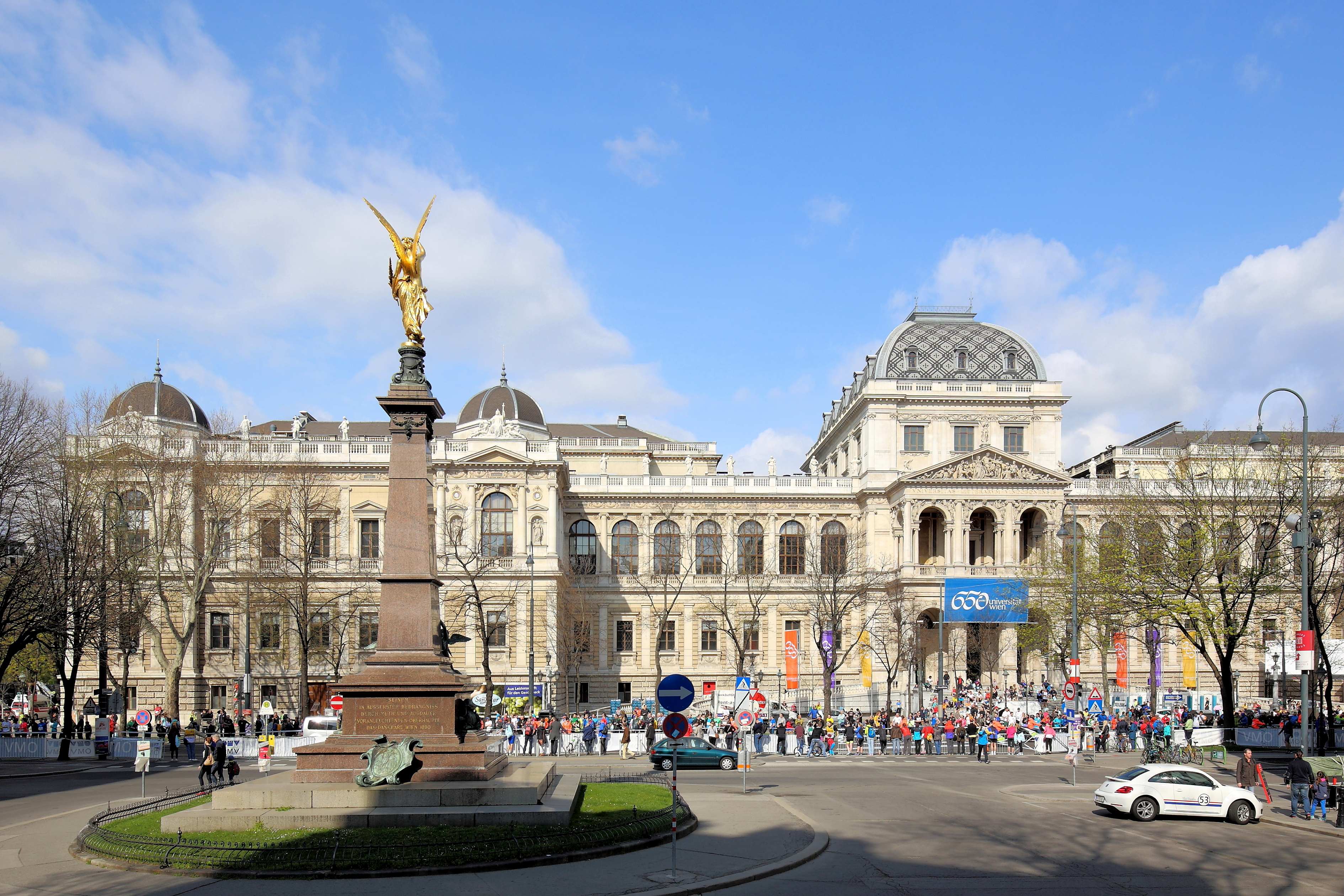 Fassade des Hauptgebäudes der Universität Wien am Universitätsring in der österreichischen Bundeshaupstadt Wien. Das Universitätsgebäude wurde von 1877 bis 1884 nach Plänen des Architekten Heinrich von Ferstel errichtet. Im Vordergrund das Denkmal für den Bürgermeister Johann Andreas von Liebenberg, das von 1887 bis 1890 errichtet wurde.